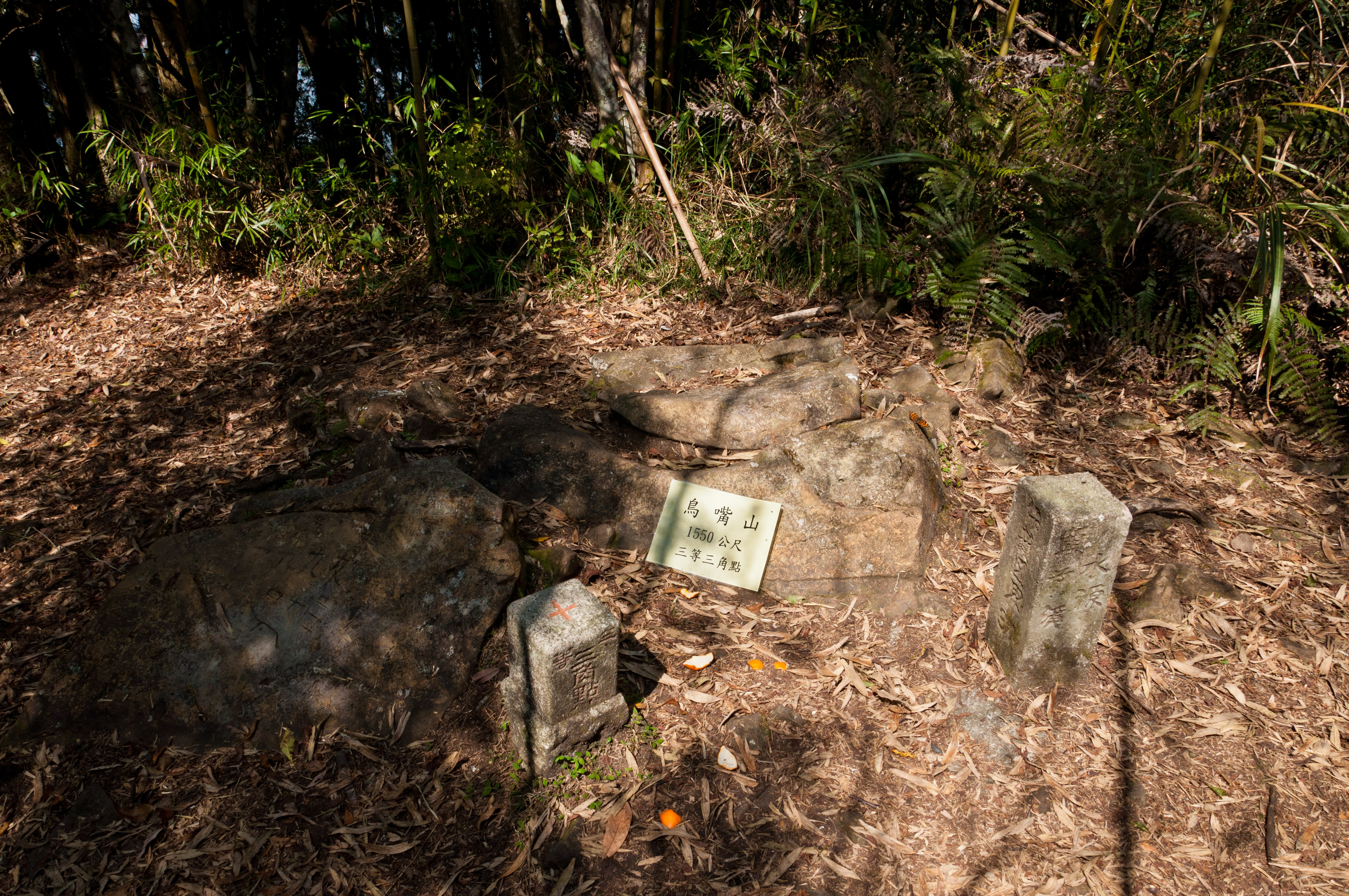 五峰鳥嘴山三角點。